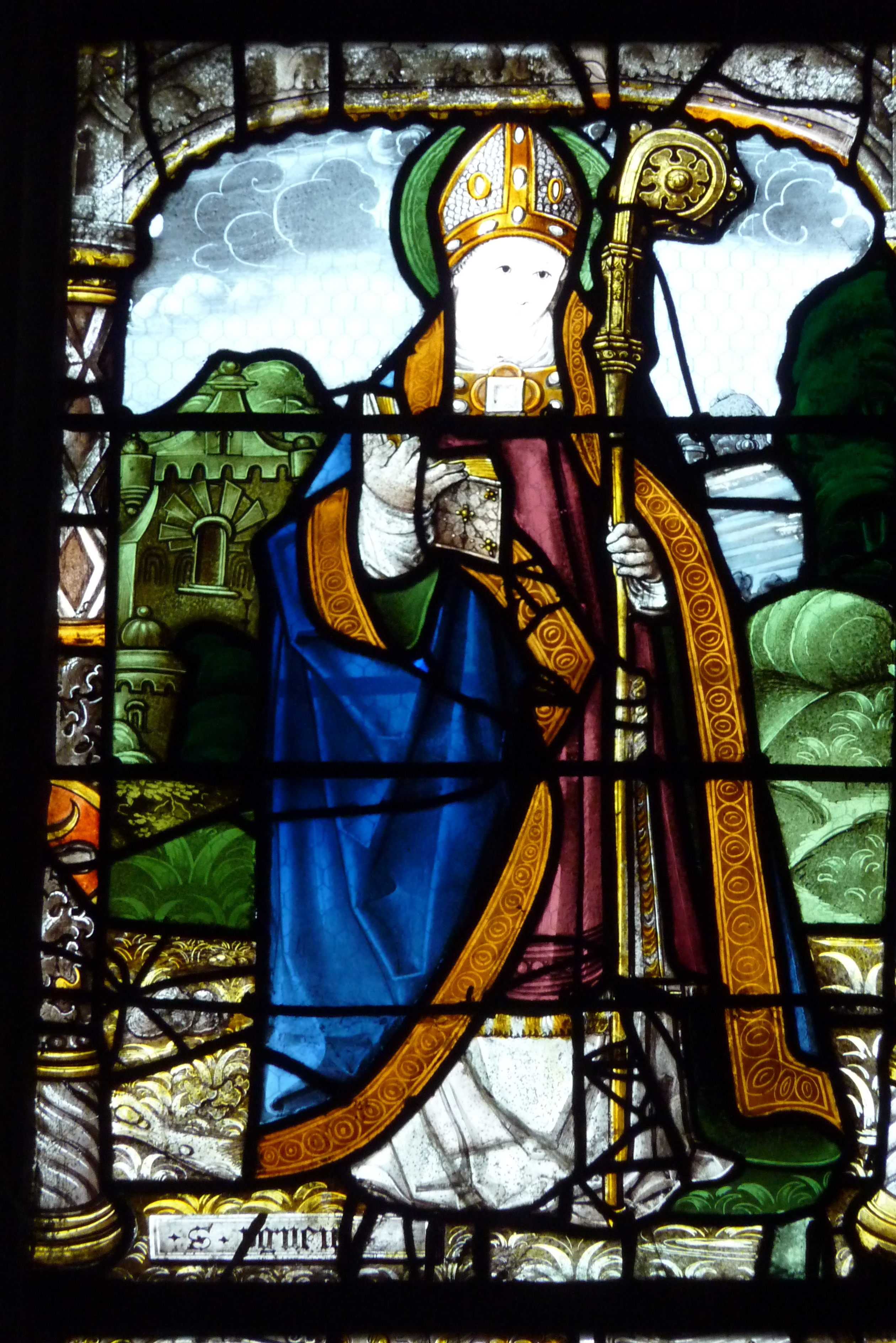 Bleiglasfenster (Detail) in der katholischen Pfarrkirche Église Saint-Aignan de Chartres in Chartres, Darstellung: hl. Aignan (Fenster aus dem frühen 16. Jahrhundert lt. Infoblatt in der Kirche)